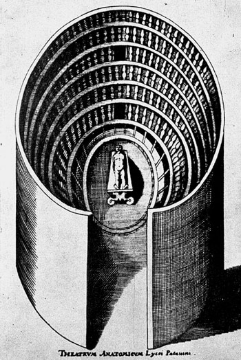 Gravure représentant le théâtre anatomique de Padoue parue dans le Gymnasium Patavium de J. Ph. Tomasini paru à Udine en 1654